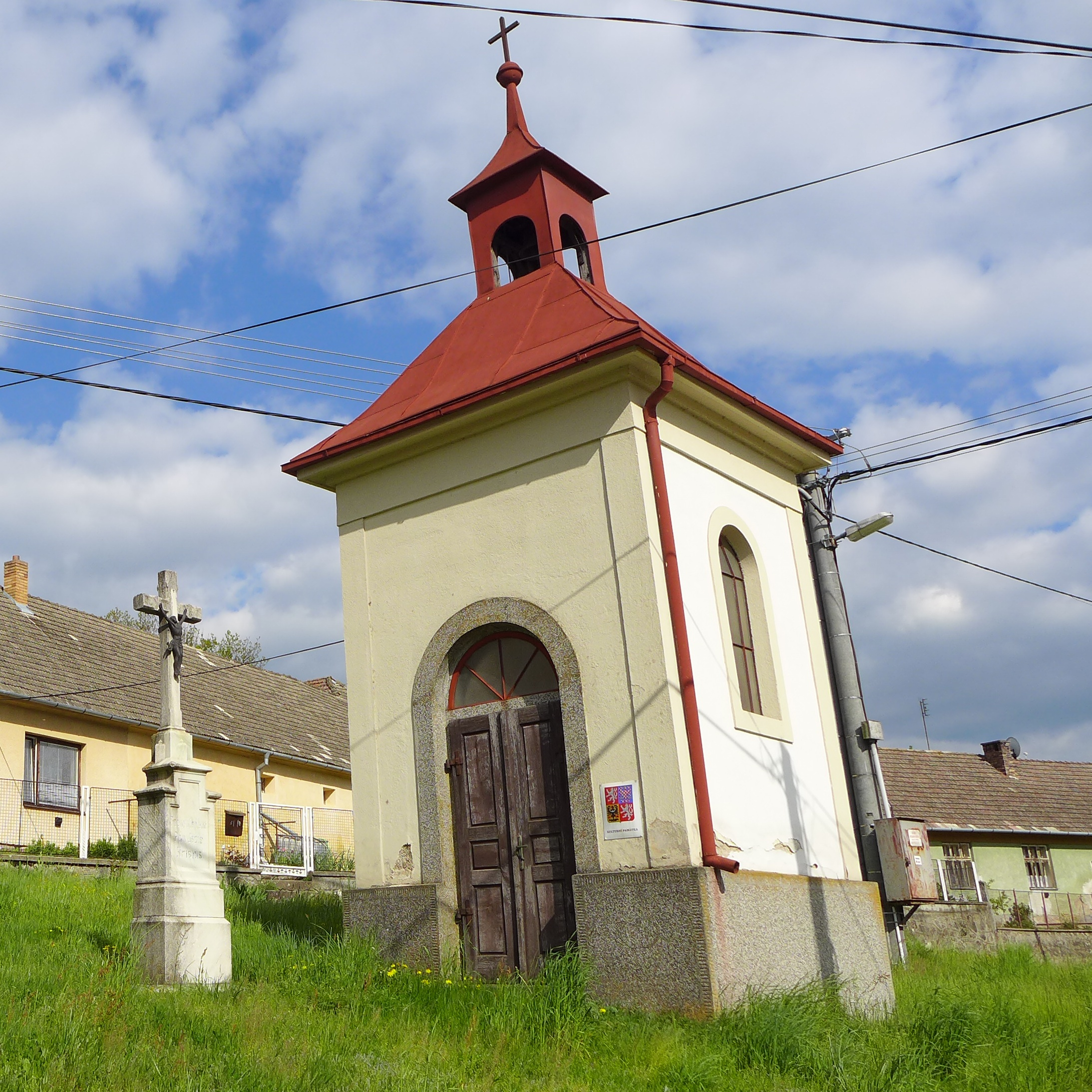 Kaple (Oslava), Oslava